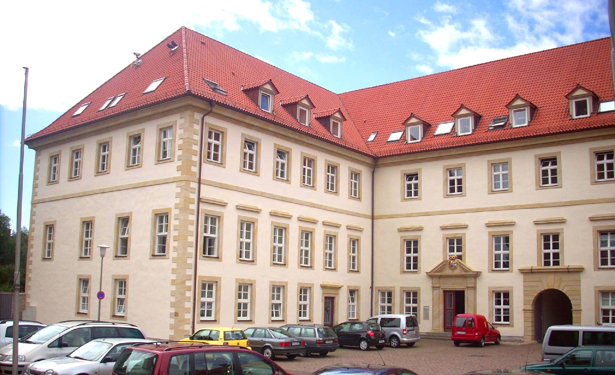 Hildesheim, Domhof: Bischöfliches Generalvikariat; bis 1803 Fürstbischöfliches Residenzschloss